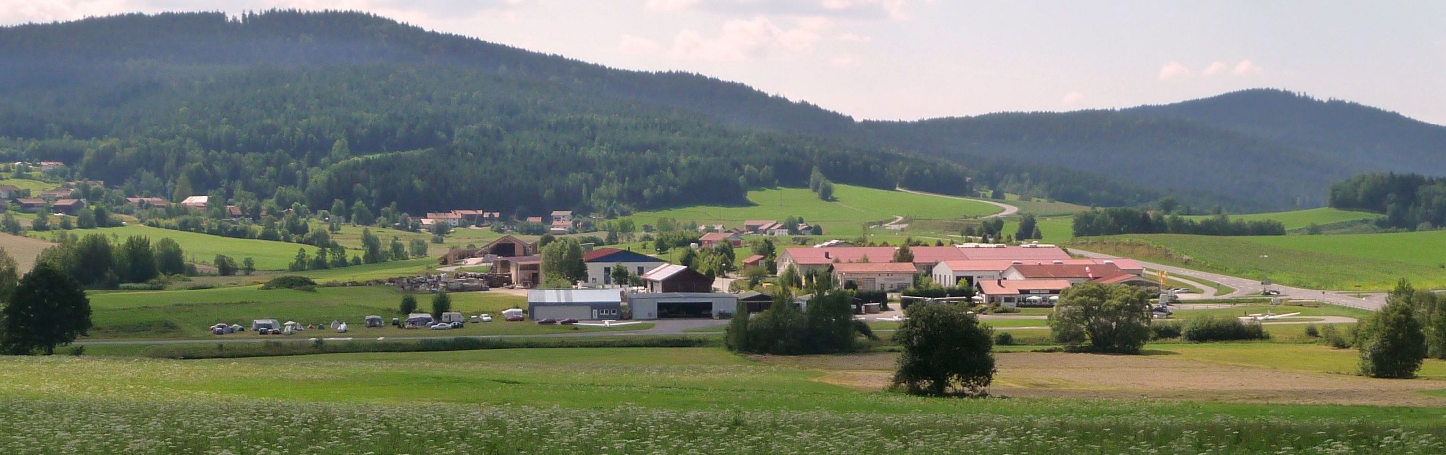 Blick auf den Flugplatz Arnbruck